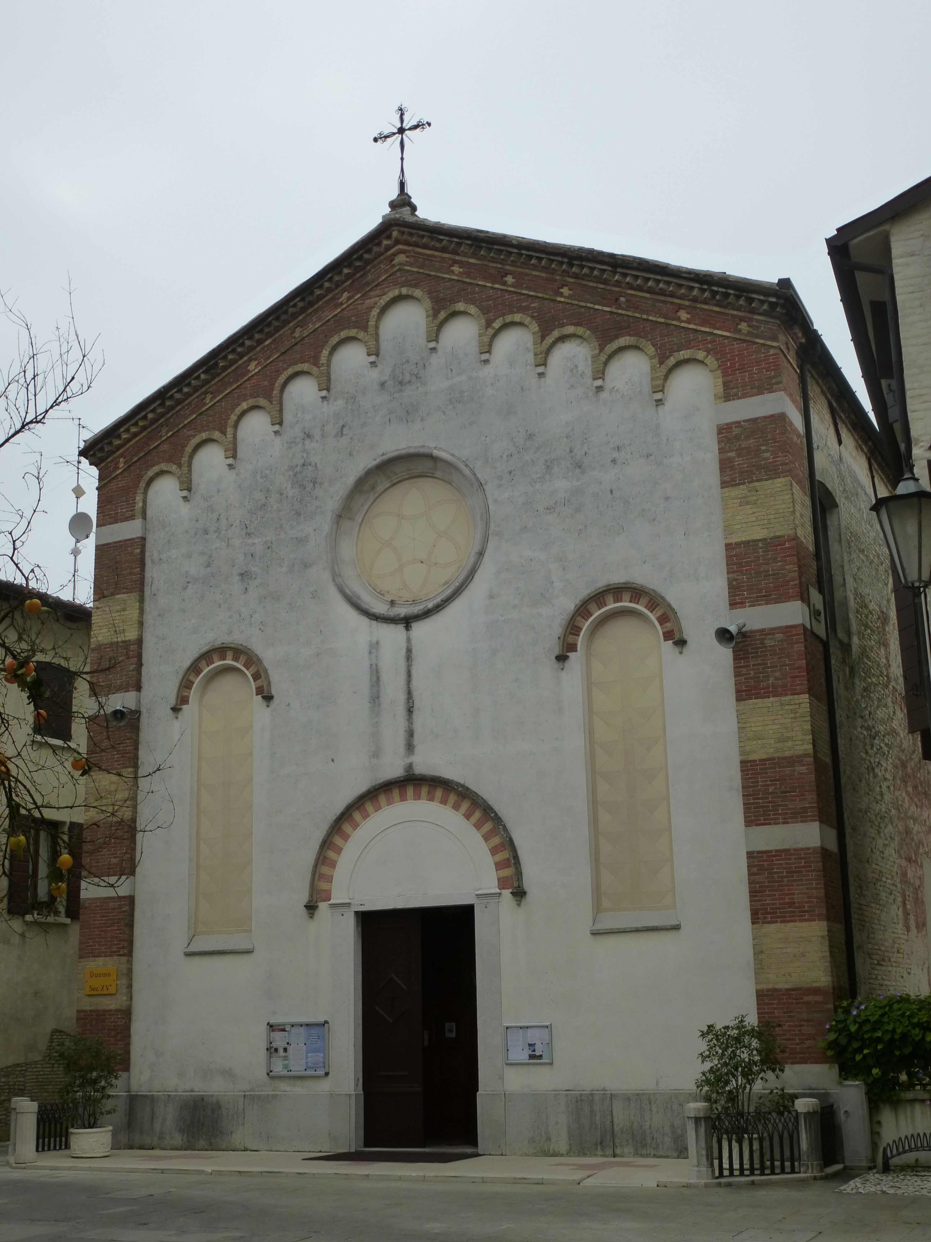 Duomo